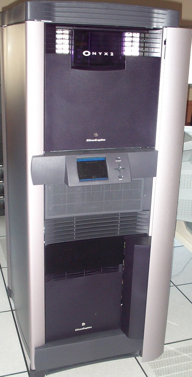 Plan général d'une Onyx2 modèle rack. Photo de JC Penalva